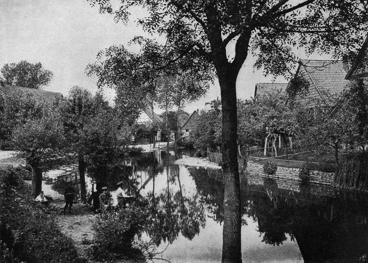 Originalbeschreibung „Exten bei Rinteln“. – Rinteln, Niedersachsen, Deutschland. Der abgebildete Fluss ist die Exter.